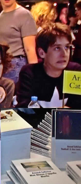 Arnaud Cathrine signing his books at Salon du Livre et de la Presse Jeunesse in Montreuil France